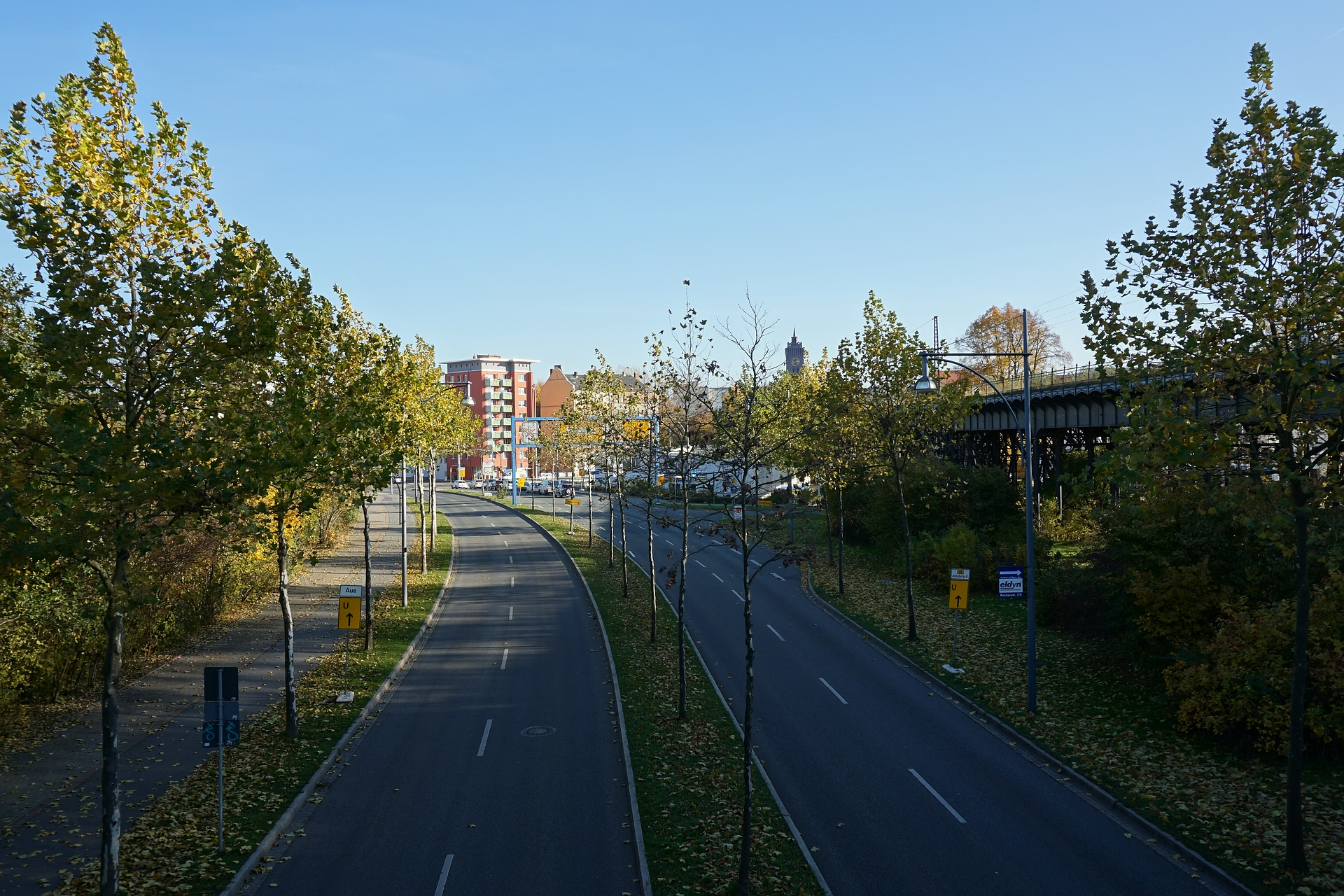 Chemnitz, Reichsstraße, Neue Verbindung zwischen der Zwickauer Straße und der Annaberger Straße